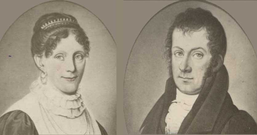 Michael van der Tuuk (1781-1842) en Ellegonda Durandina Dijck (1783-1851)